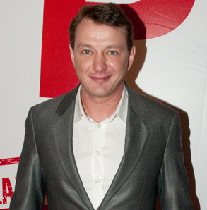 Марат Башаров 20 марта 2011 года на премьере фильма «Служебный роман: Наше время»